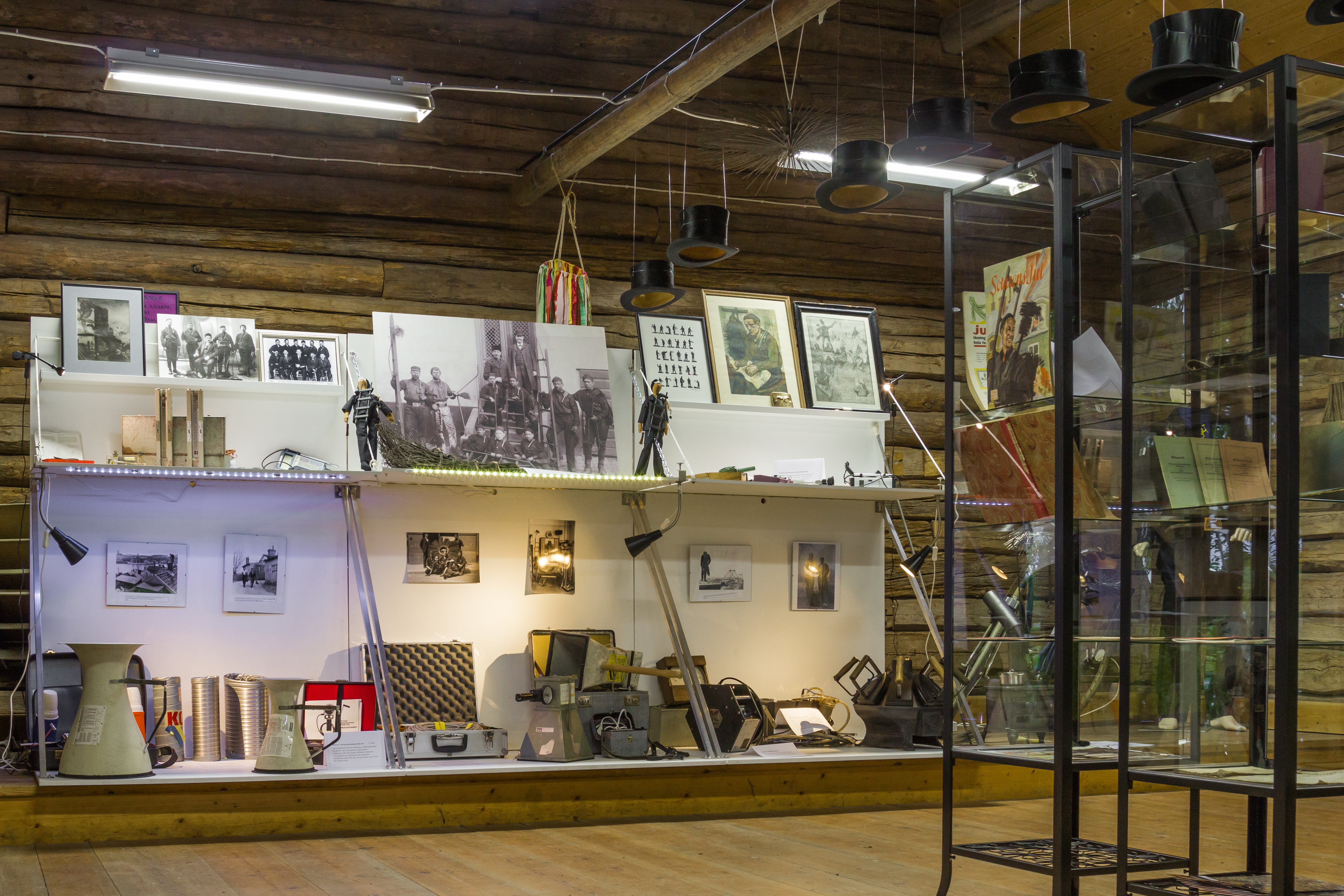 Midsommarafton 2015 på Hedemora gammelgård